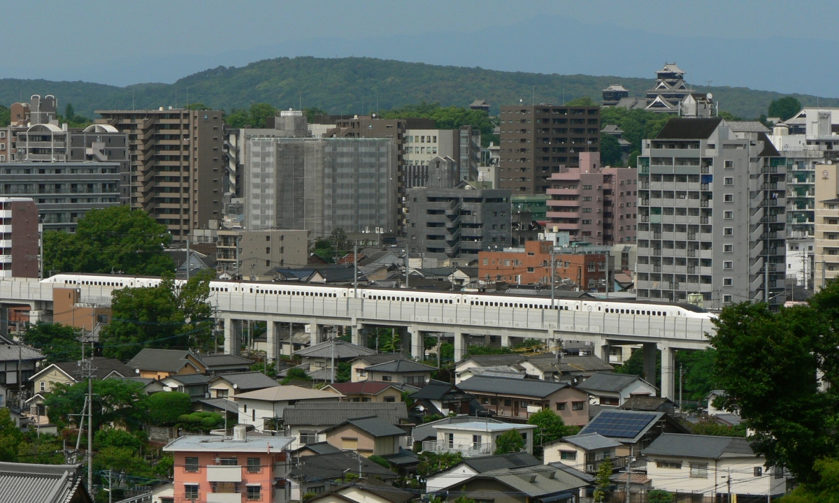 熊本城と九州新幹線(800系)